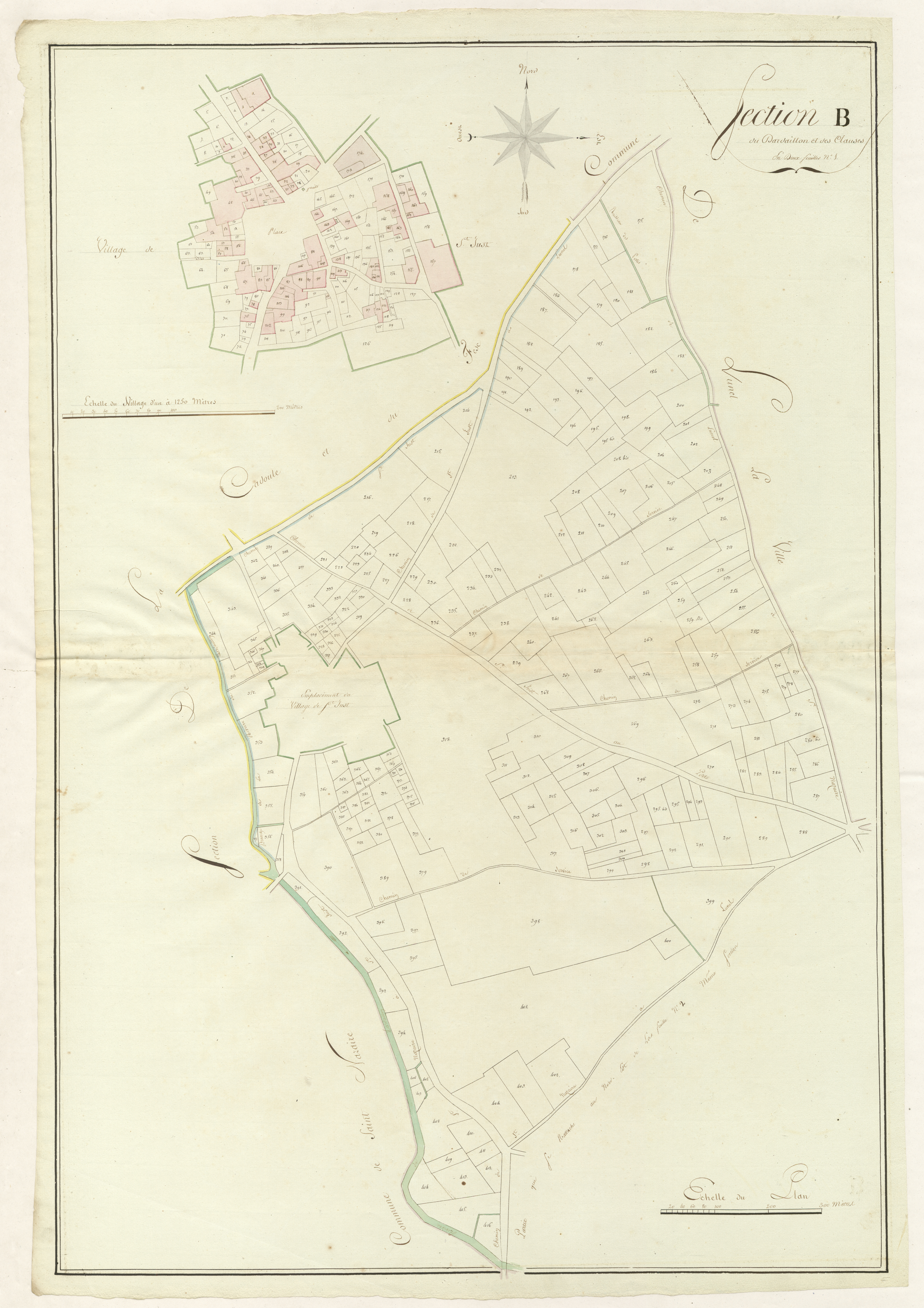 Saint-Just. - Cadastre napoléonien : section B1 de Dardailhon et des Clauses.